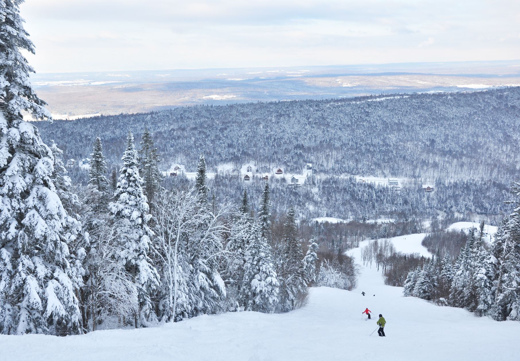 Massif du Sud